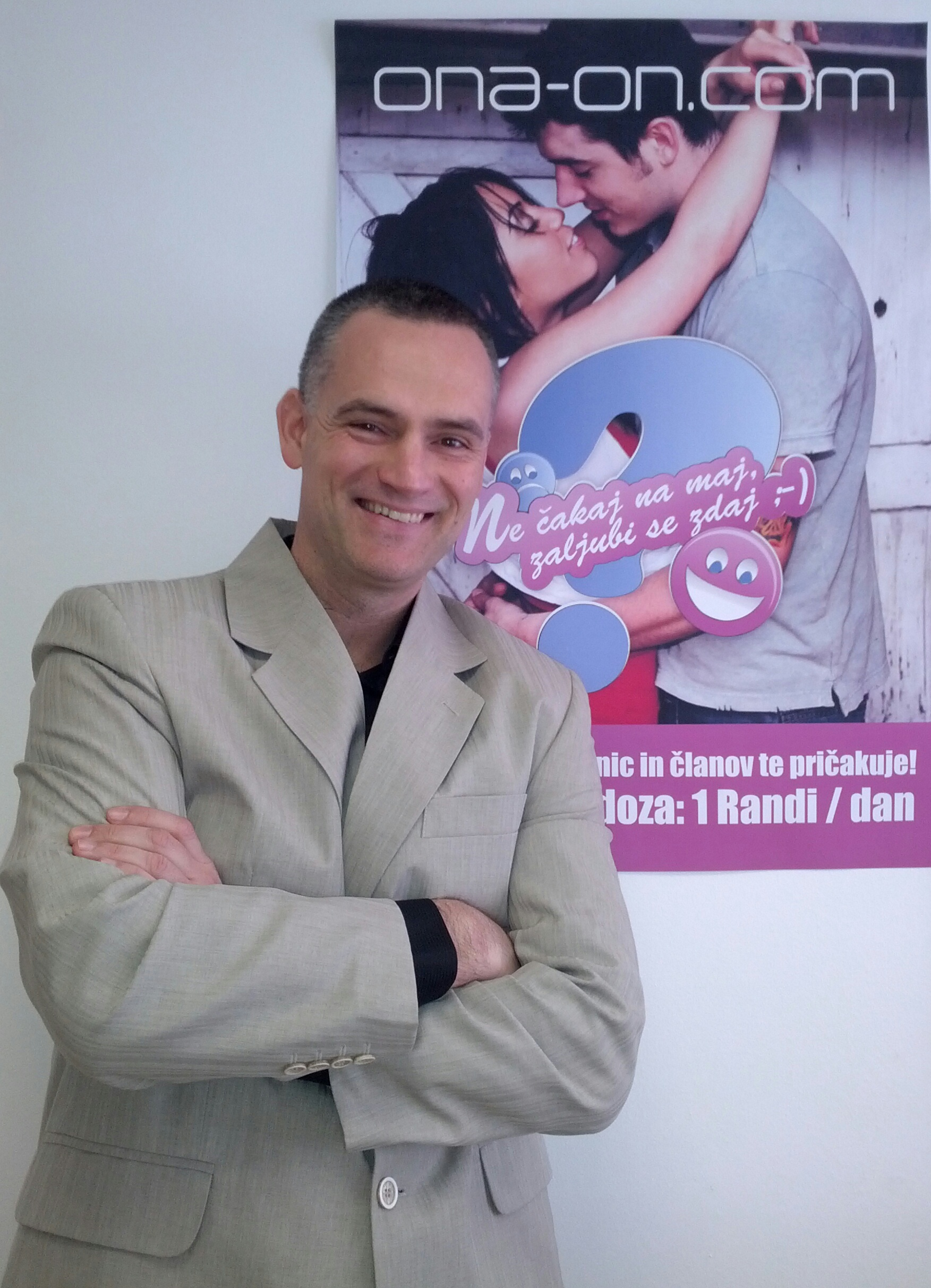 Luka Kogovšek